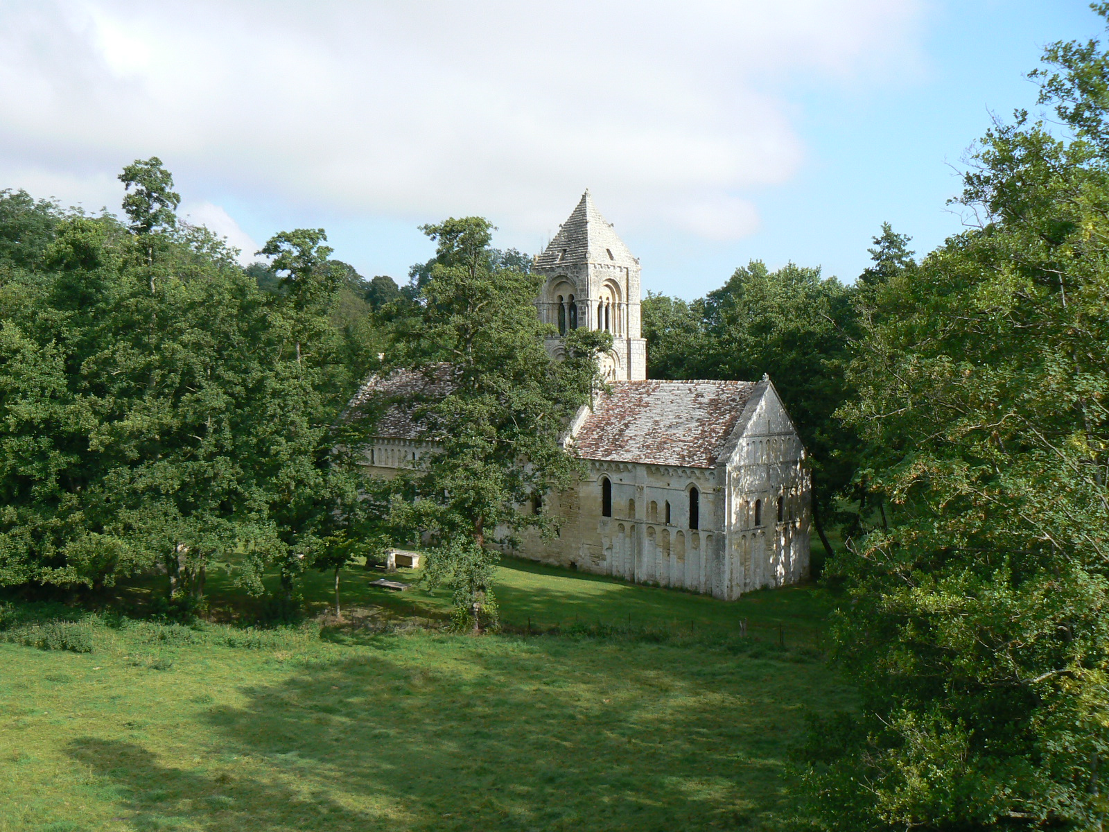 Vieille eglise de thaon.JPG